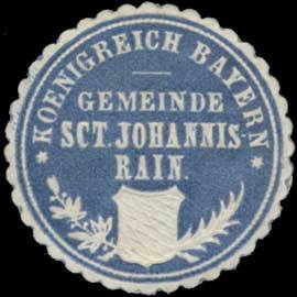 Sealing stamp Title: Koenigreich Bayern Gemeinde Sct. Johannisrain Description: blau, weiß, geprägt Place: St. Johannisrain size: 3 cm